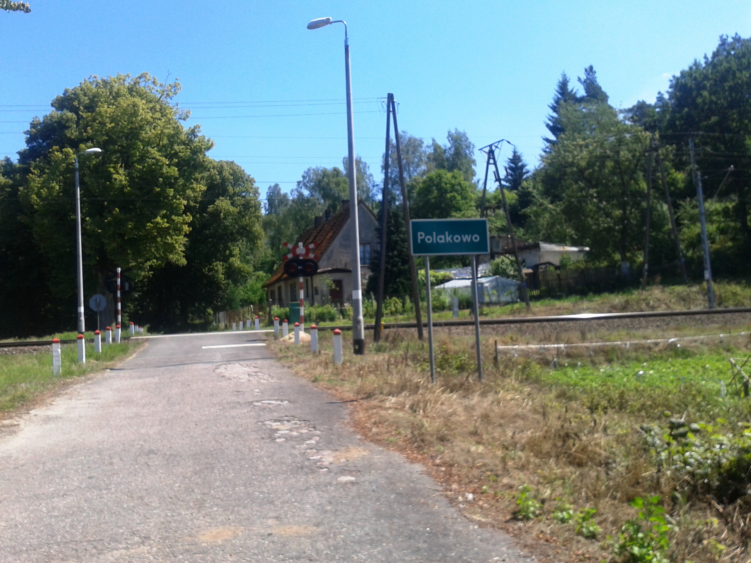 Polakowo w gminie Łobez